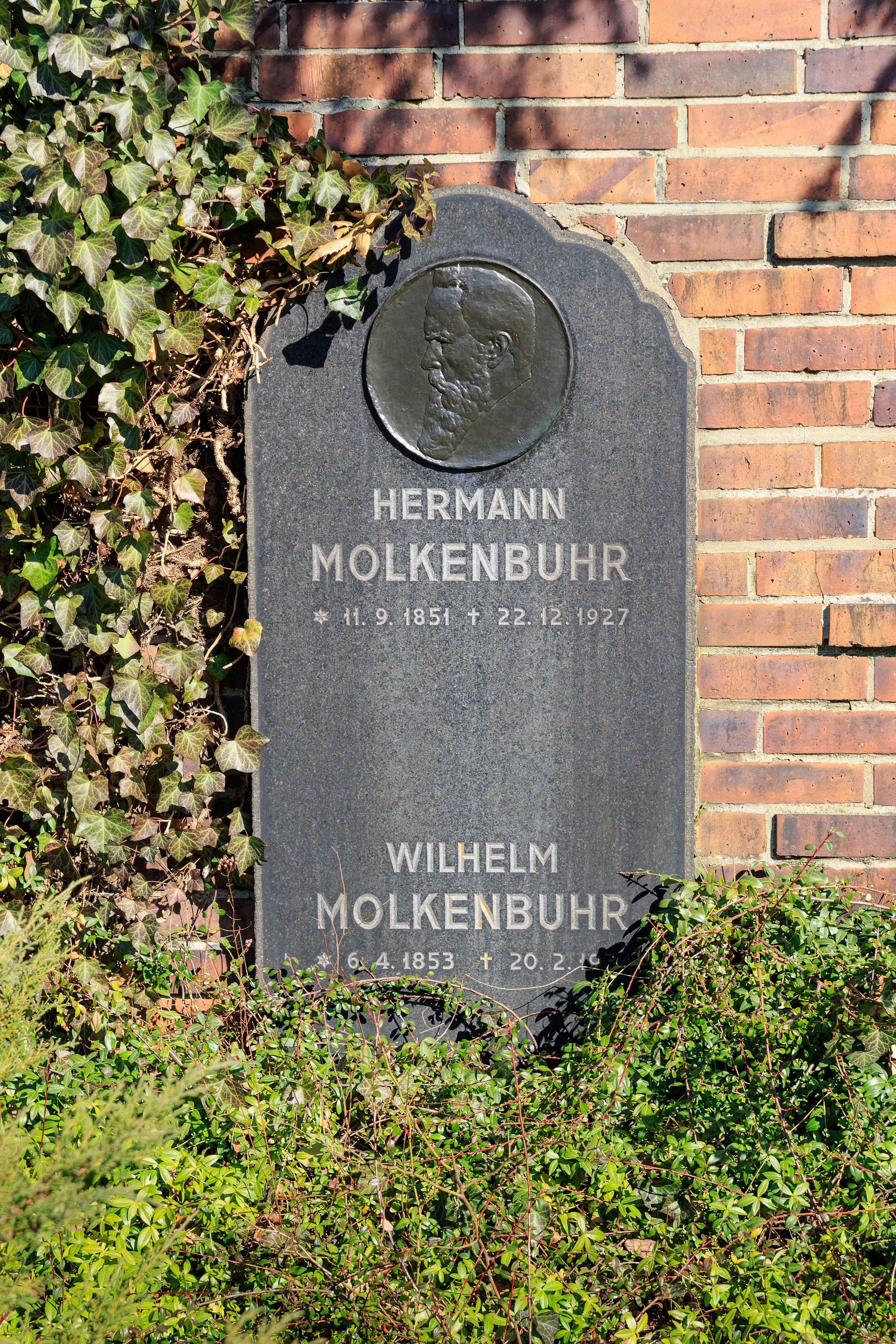 Zentralfriedhof Friedrichsfelde, Berlin-Lichtenberg. Gedenkstätte der Sozialisten, Grab von Hermann Molkenbuhr.